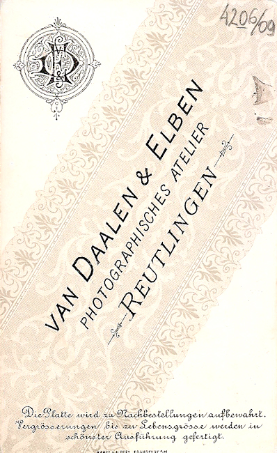 Rückseite des Portraits eines Mannes